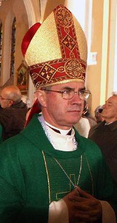 Biskup Jan Wątroba